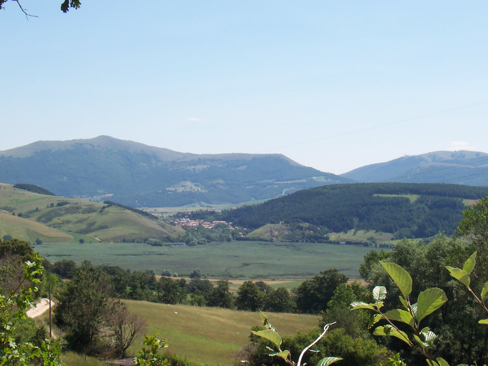 vista dalla frazione di Forcatura della palude e del paese di Colfiorito